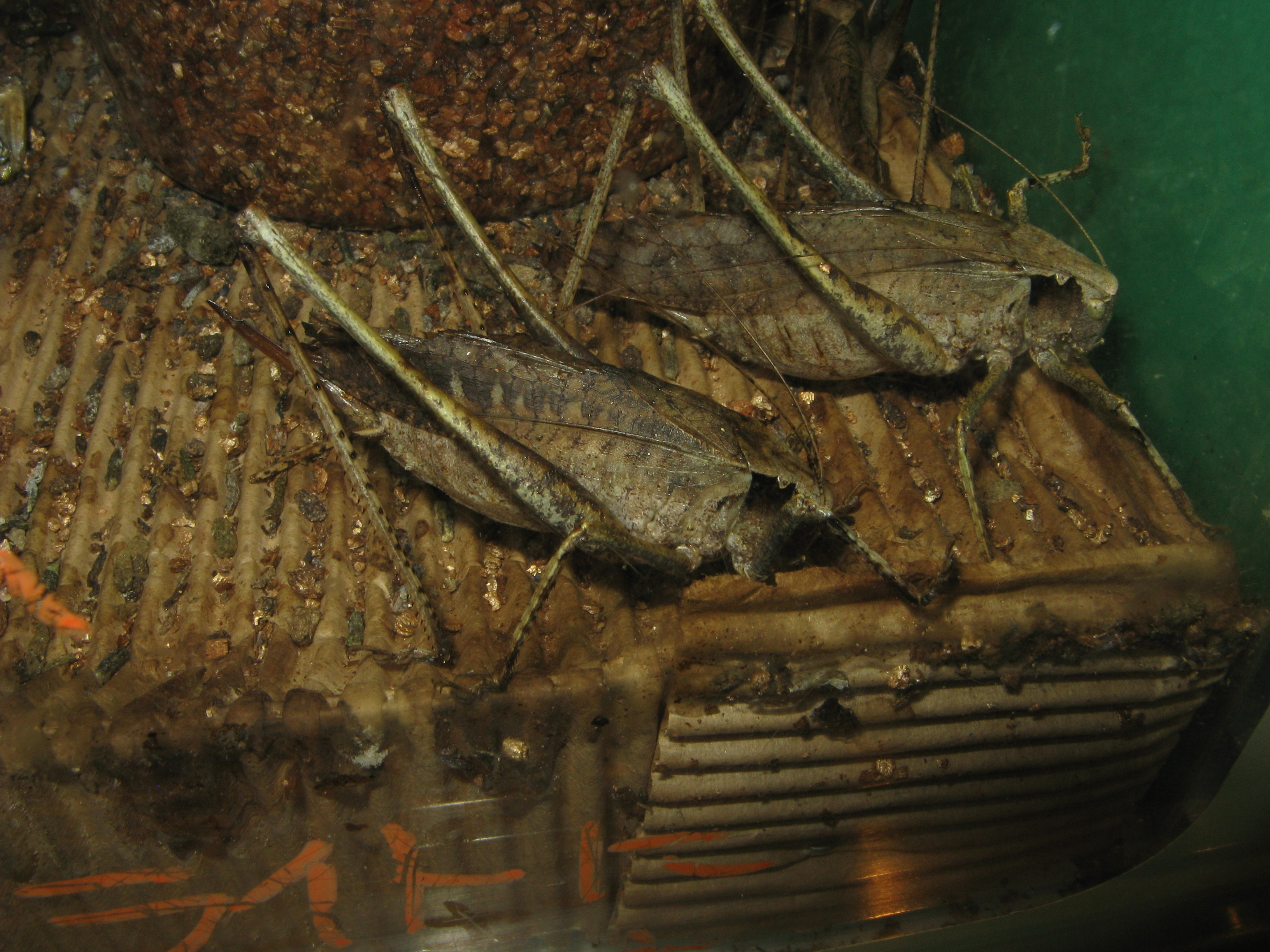 Scientific name Mecopoda elongata